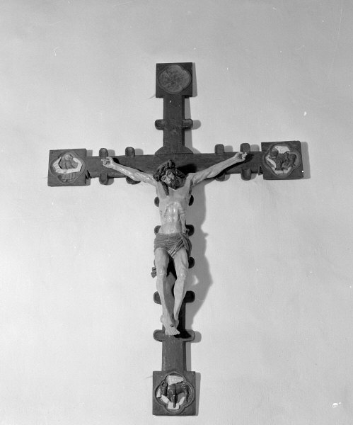 Triumfkrucifix från omkr. 1520. Kategori: (05) KrucifixTriumfkrucifix från omkr. 1520.